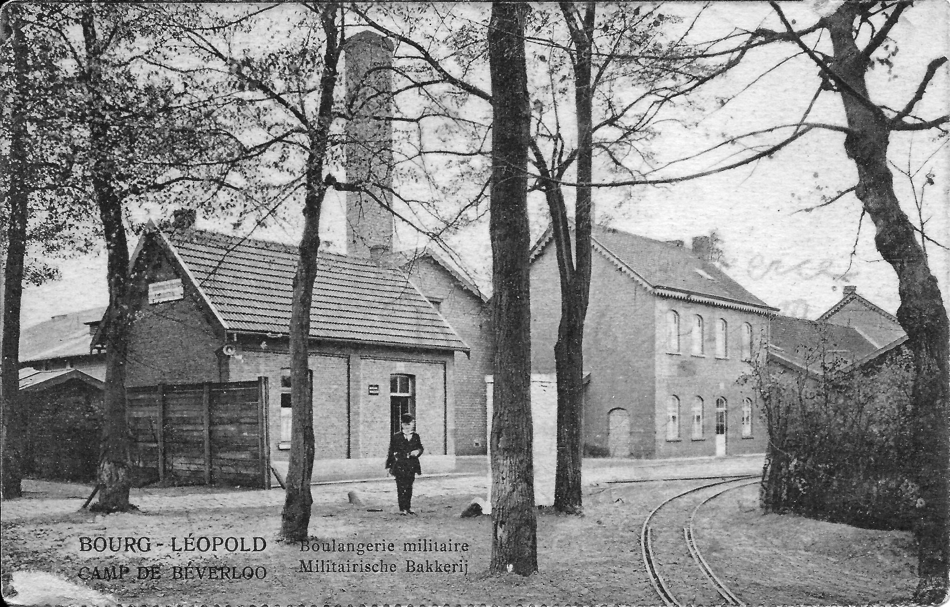 Postkaart van Beverlo kamp. Langs de buutspoorweglijn Leopoldsburg - Maaseik